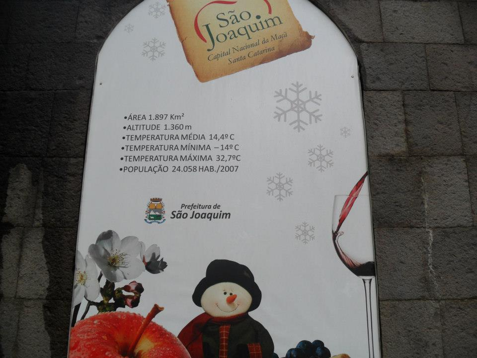 Dados Climatológicos da Cidade de São Joaquim-SC